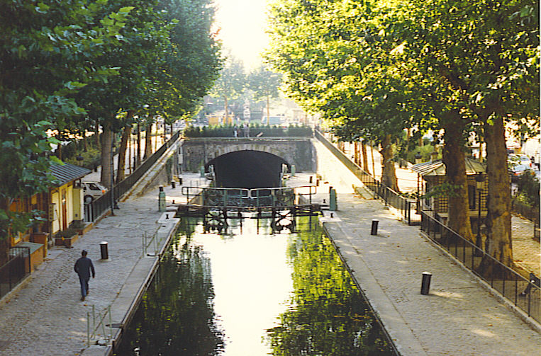 Propre Photo